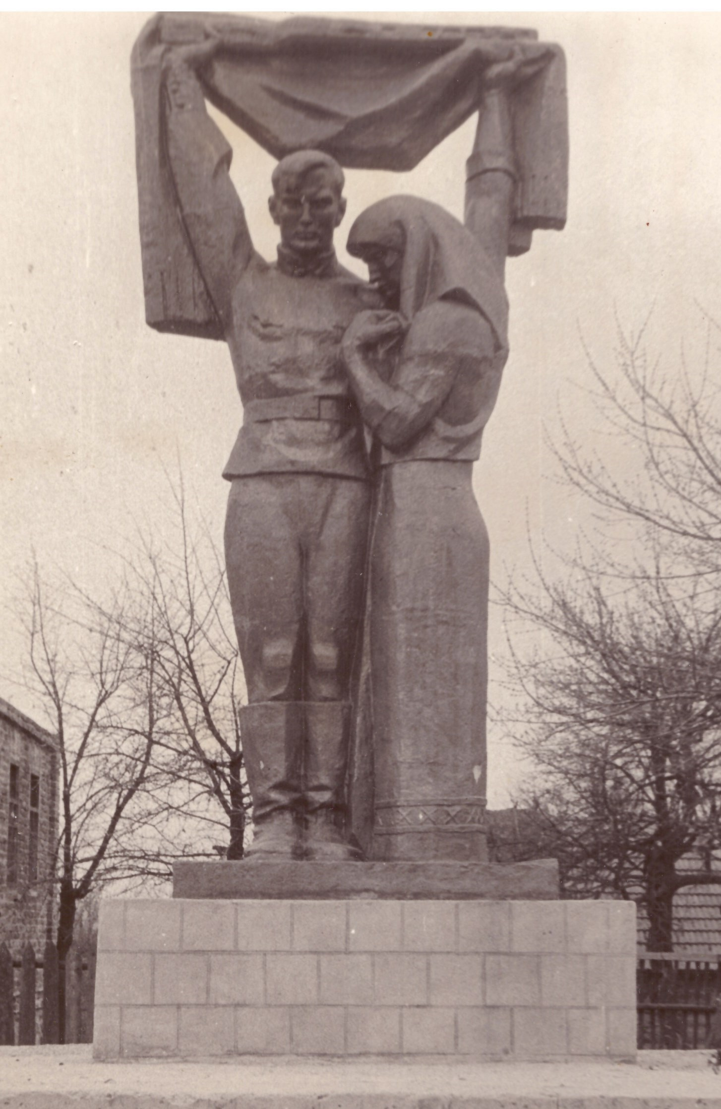 Пам’ятник загиблим воїнам-односельчанам в роки Великої Вітчизняної війни 1941-1945 р.р. С. Селець Народицький район Житомирська область. 1970. Скульптор Таранченко В.О., архітектор Іванчук М.П. Литий бетон.